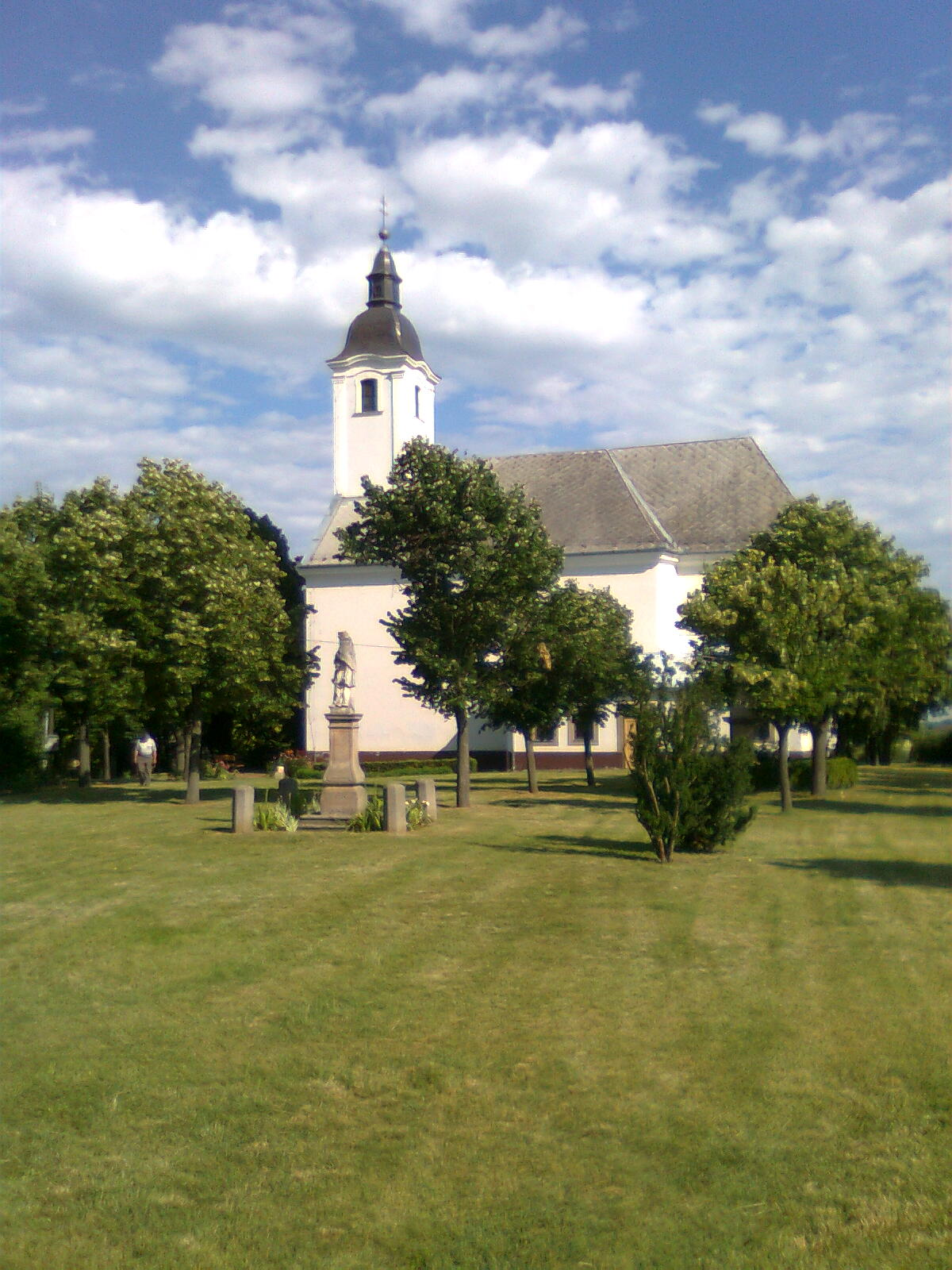 Tiszaalpári római katolikus templom és Nepomuki Szent János szobra